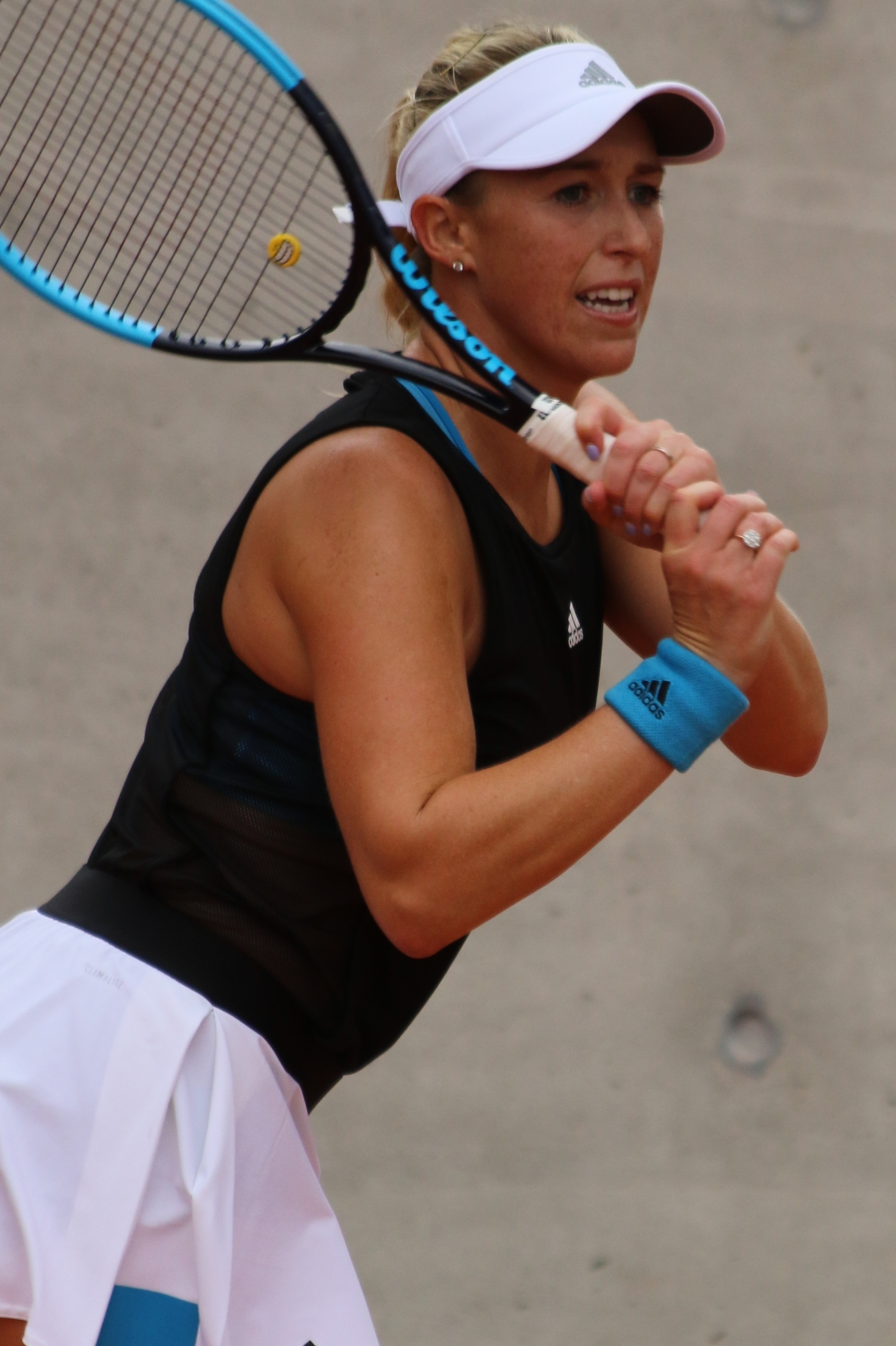 Guarachi RG19 (33)